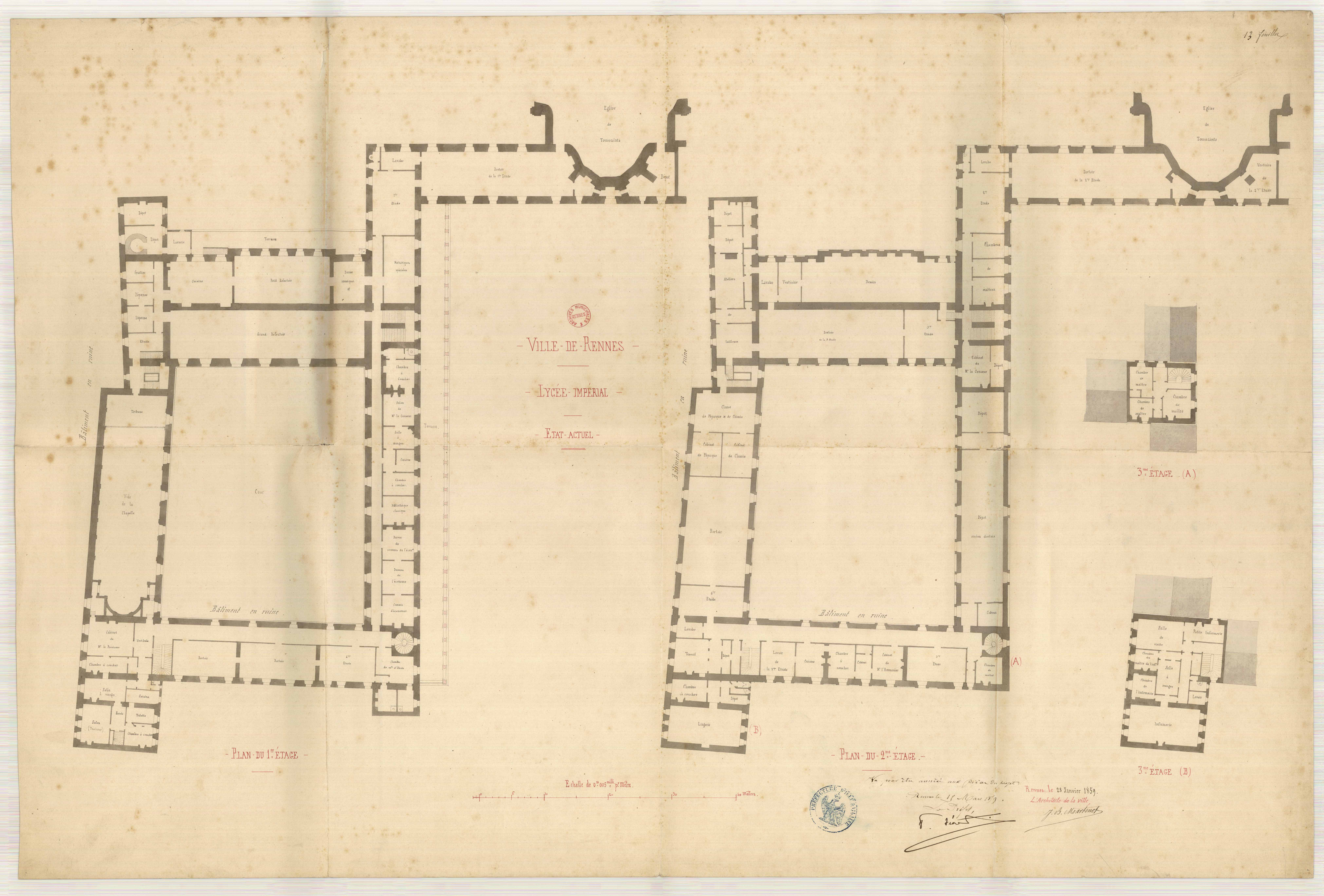 Plan des 1er, 2e et 3e étages du lycée impérial de Rennes (aujourd'hui Lycée Emile-Zola, avenue Jean-Janvier). Archives municipales de Rennes, 2 Fi 2673.